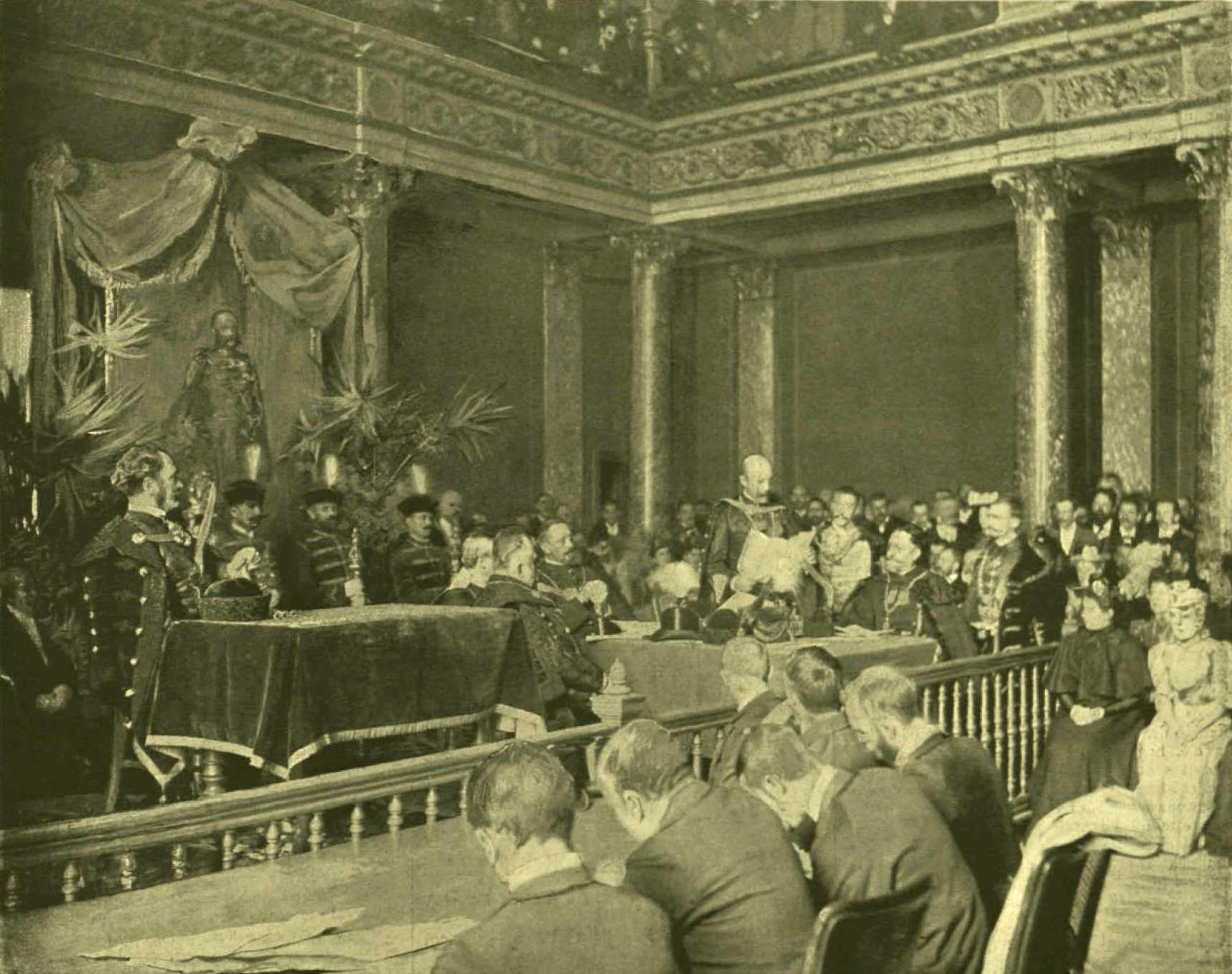 Doktorrá avatás királyi kitüntetés mellett (Sub auspiciis Regis). A Magyar Tudományos Akadémia nagy dísztermében. Vasárnapi Ujság, 1895. október 30.